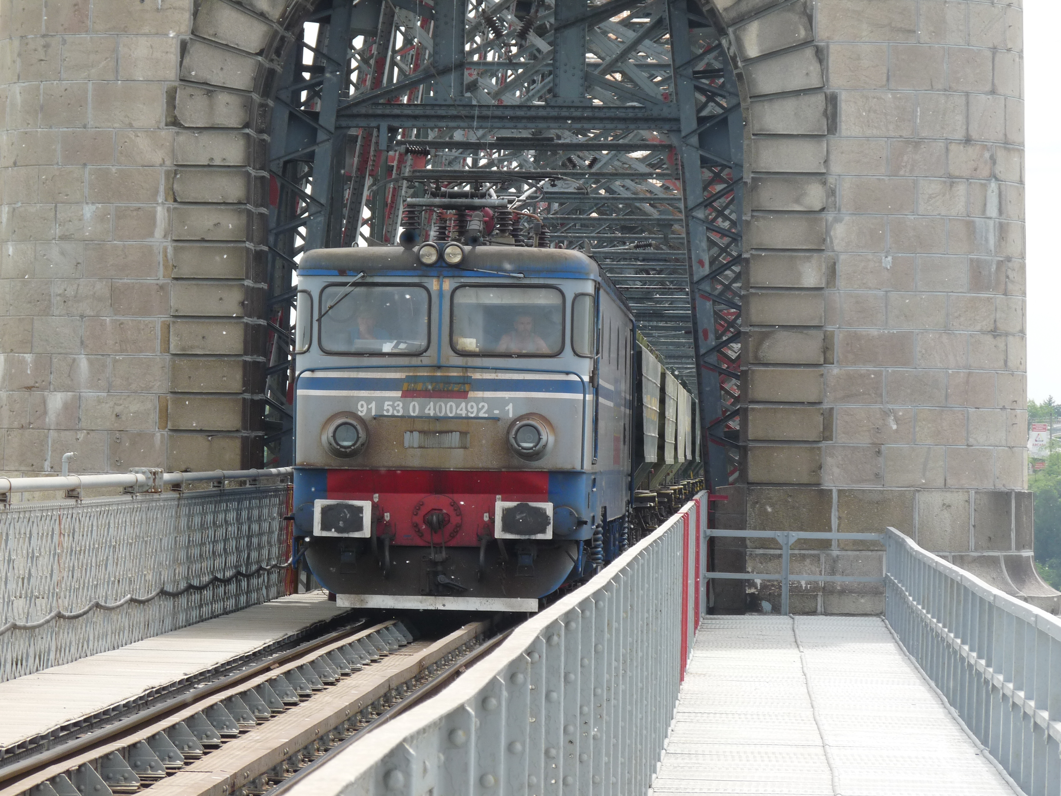 De spoorbrug Anghel Saligny bij Cernavodă